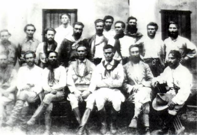 Comando da Coluna Prestes. Luís Carlos Prestes é o terceiro sentado, da esquerda para a direita.